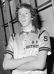 il cestista Walter Magnifico con la maglia della Cestistica San Severo nel 1975 Licensing Magnifico